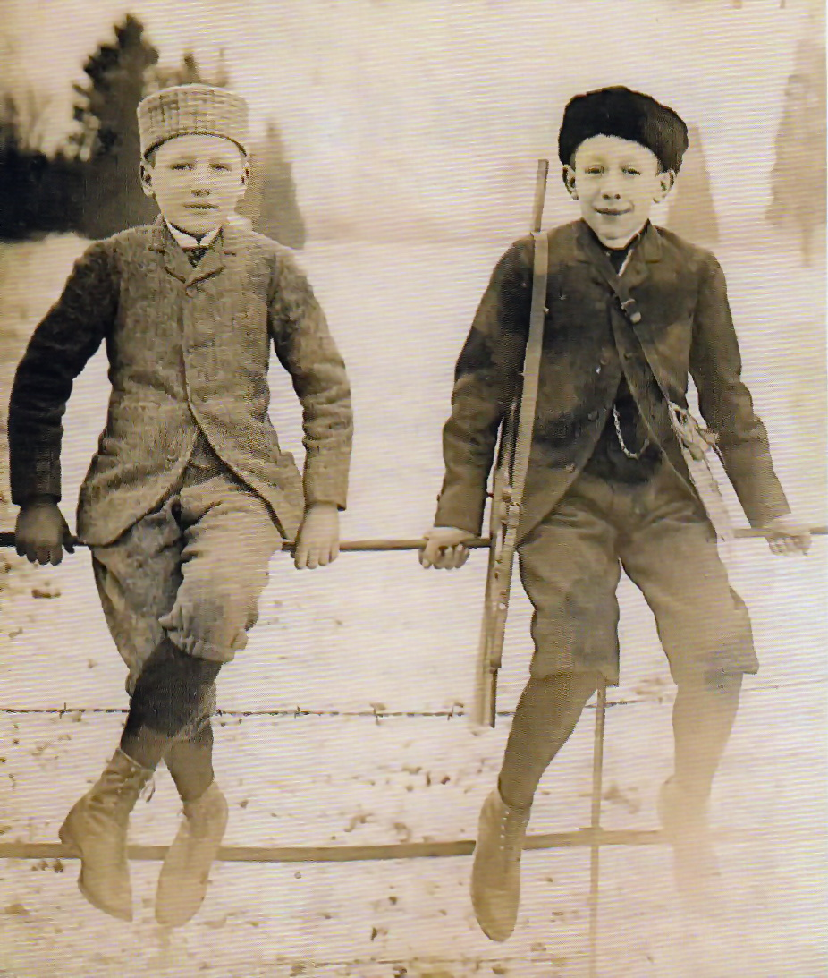 De twee jongste zonen van de Maastrichtse industrieel Gustave Regout en zijn Belgische vrouw Louise Pétry. Links Eduard (12 jaar) en rechts Adolf (13 jaar). Familiearchief Regout, RHCL Maastricht.